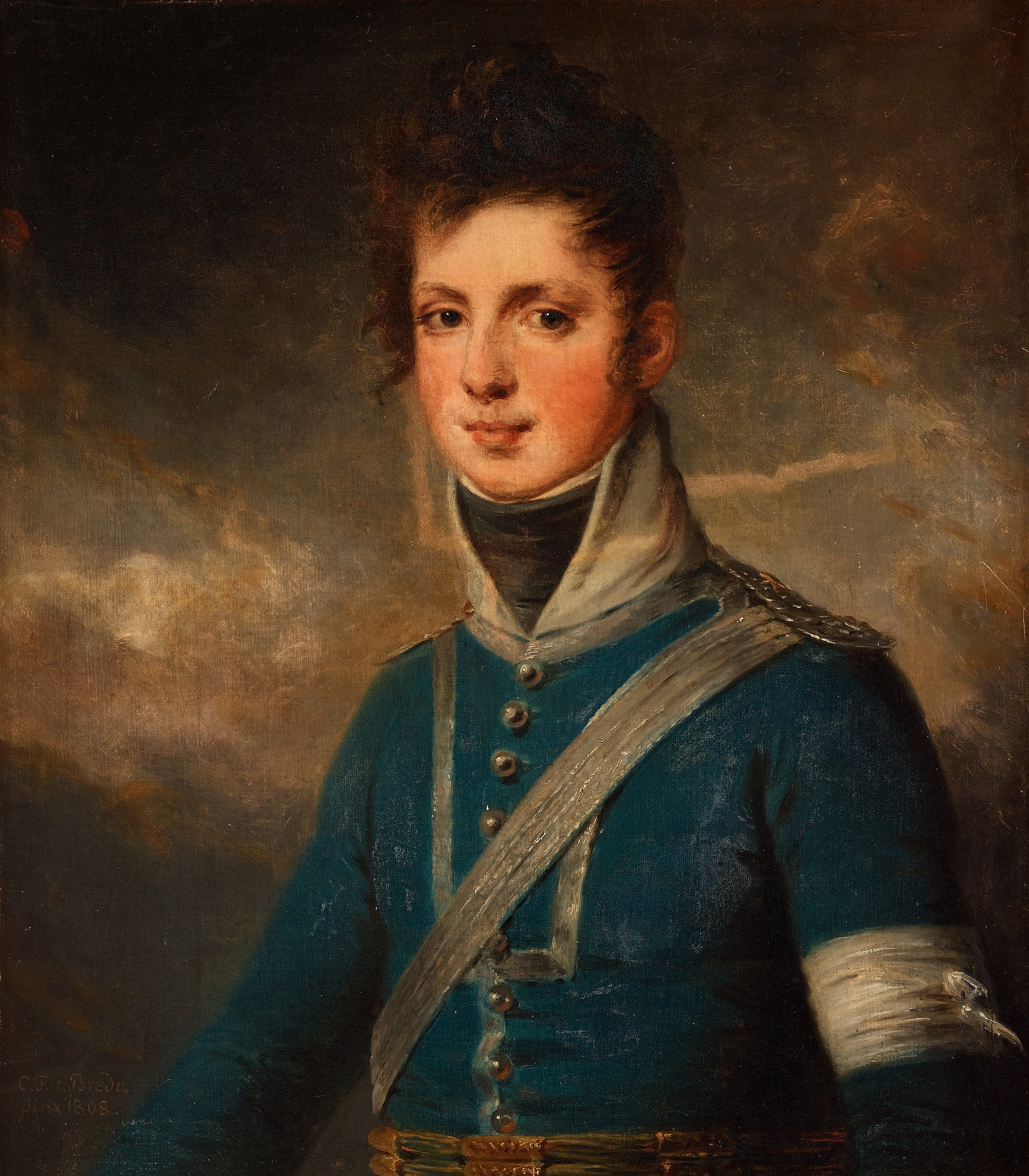 Carl Fredrik Reinhold von Essen iklädd uniform för en Kornett vid Livgardet till häst. Avporträtterad 1808 av Carl Fredrik von Breda.